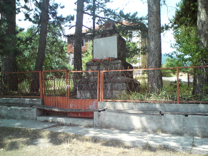 Spomenik NOB Vrbjani